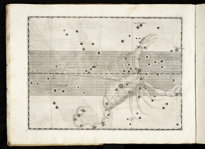 Ilustracion de la constelacion de Scorpius en la Uranometria de Johann Bayer.